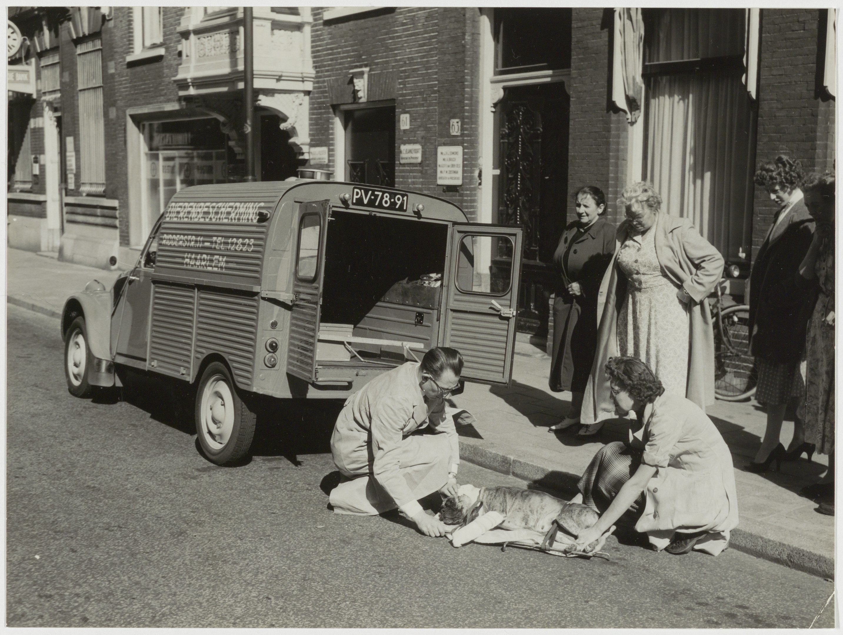 CollectieCollectie Fotoburo de BoerInventarisnummerNL-HlmNHA_54004066BeschrijvingAmbulance van de DierenbeschermingFotonummerNL-HlmNHA_1478_0987DocumenttypeHistorieprenten, tekeningen en foto'sVervaardigerBoer, Cees de (1918-1985) Soort vervaardigerFotograaf LandNederland ProvincieNoord-Holland GemeenteHaarlem PlaatsHaarlem StraatKruisweg Begindatum1969Einddatum1969TechniekFoto Trefwoordendieren